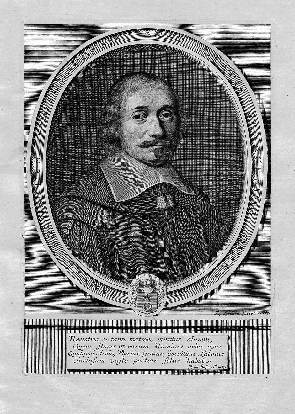 Kupfersich von Samuel Bochart